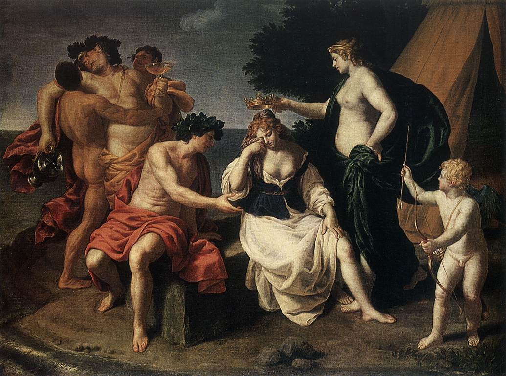 detail